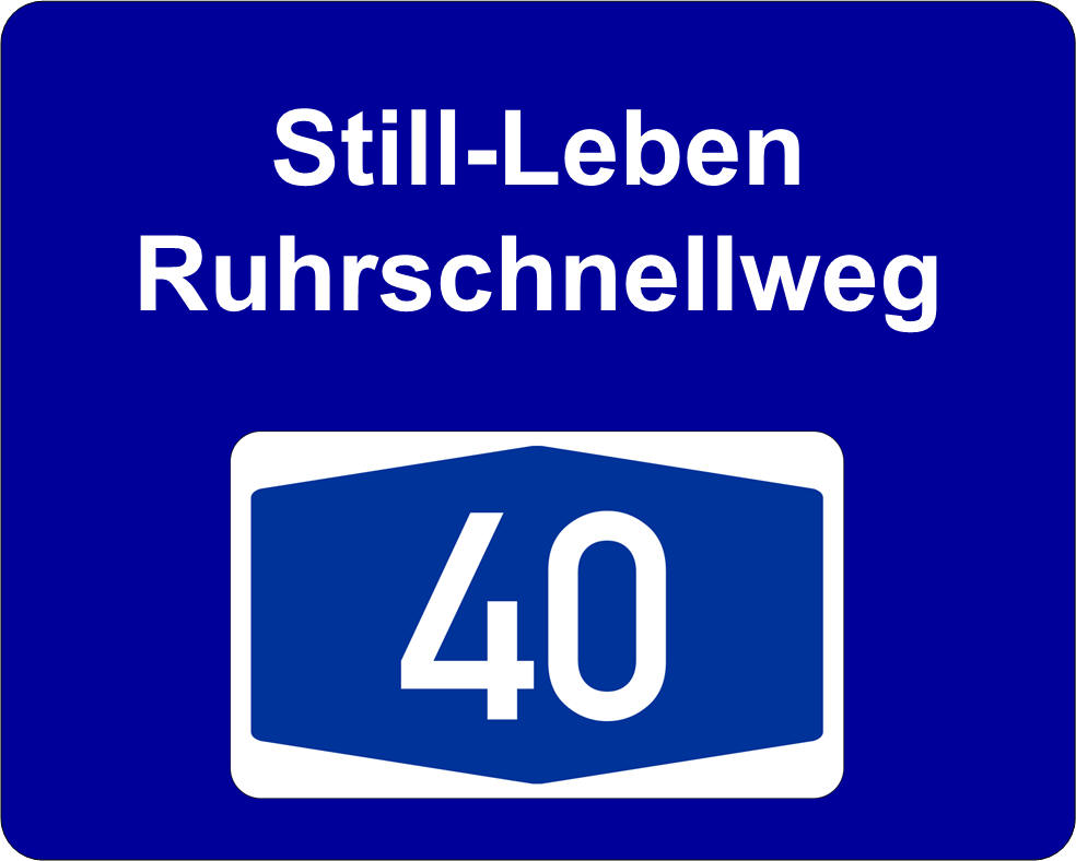 Logo der Aktion "Still-Leben Ruhrschnellweg" aus dem Kulturhauptstadtjahr 2010